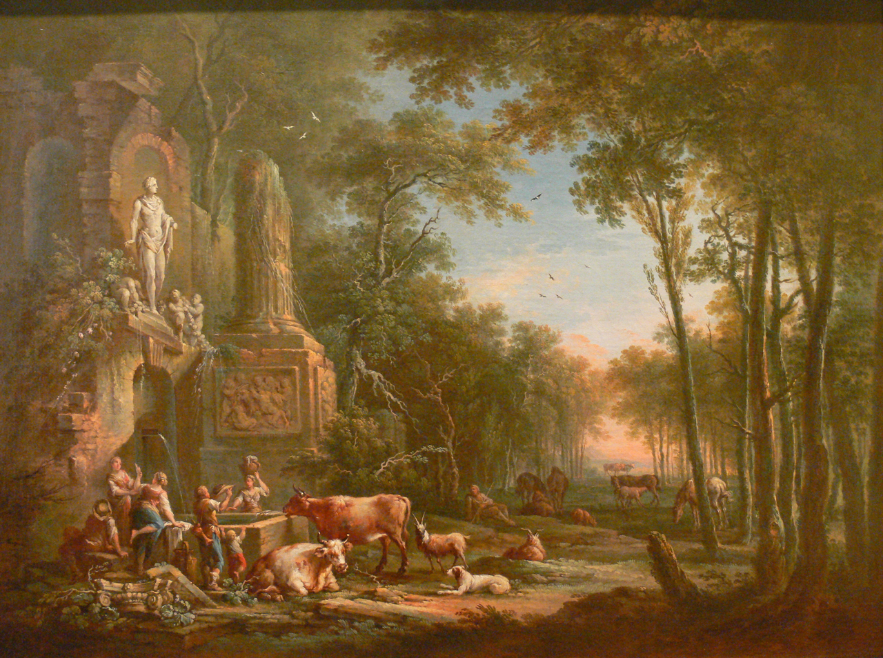 Le bocage